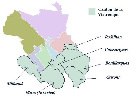 Le canton de la Vistrenque Image personnelle